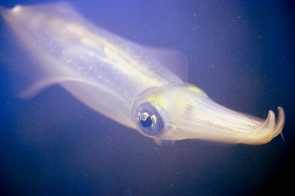 Sepioteuthis lessoniana (アオリイカ) @ Echizen matsushima aquarium.